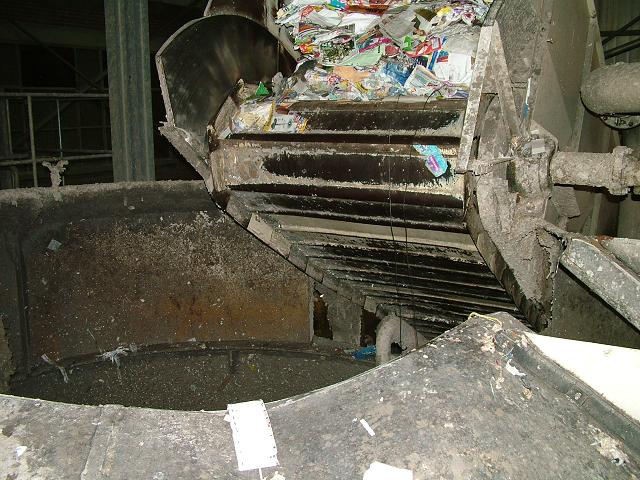 Inloop pulper